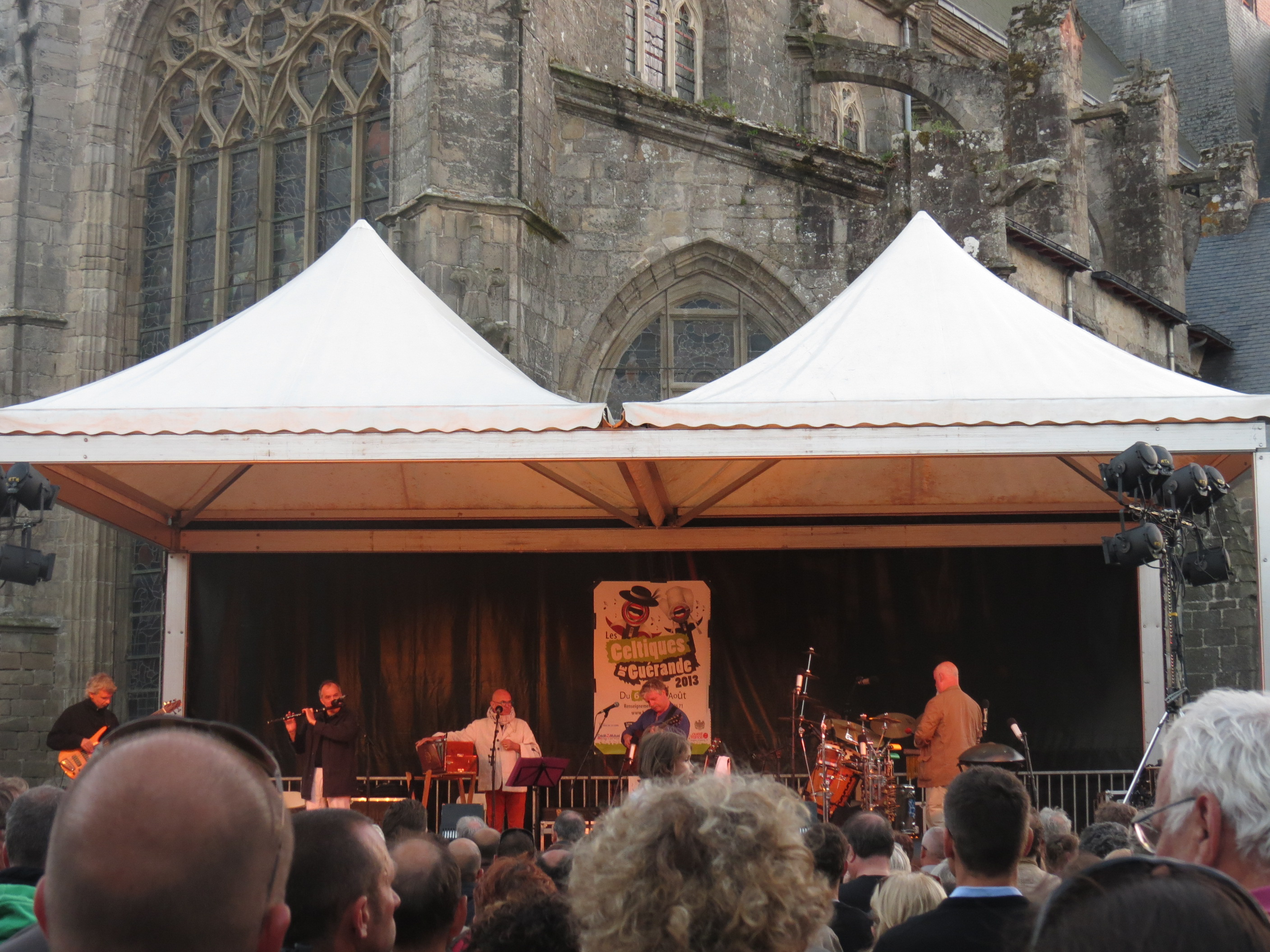 Barzaz en concert dans le cadre des Festi Cité de Guérande